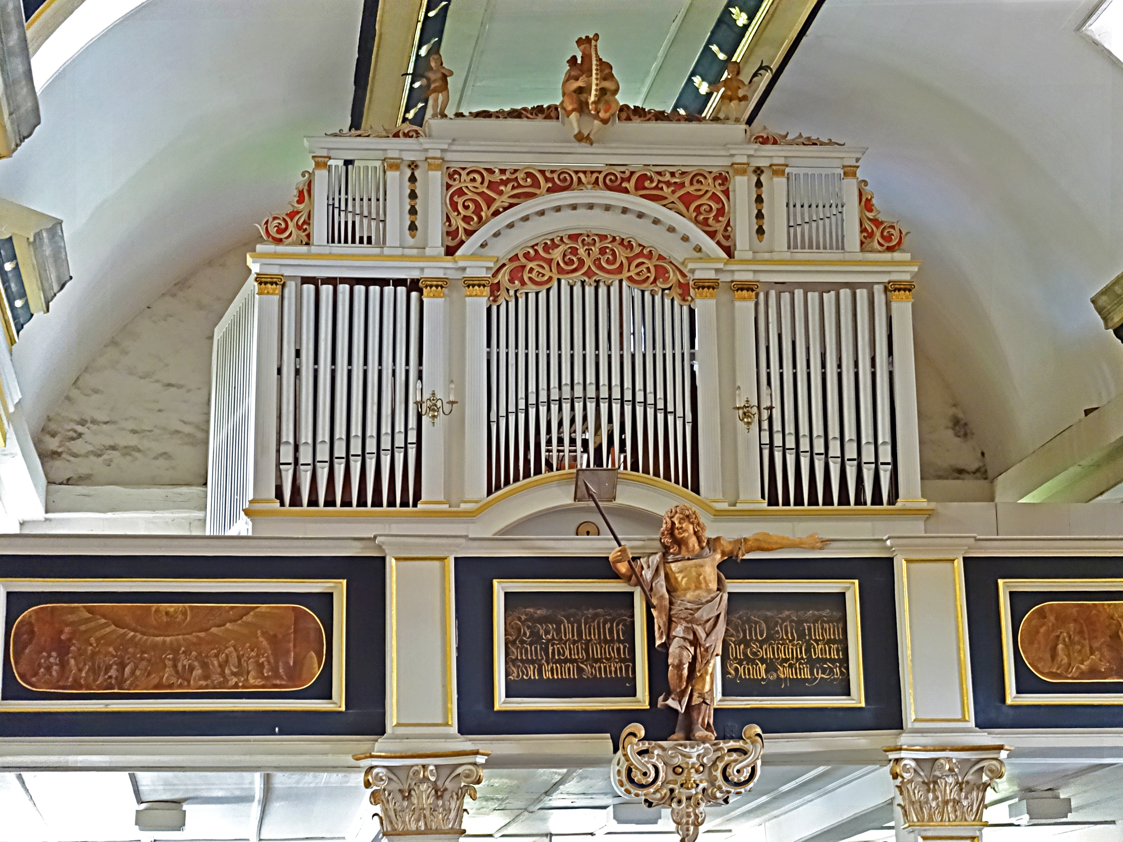 Orgel von Albin Hickmann (1898, II/P 21) in der Pfarrkirche St. Peter und Paul (Gräfentonna)